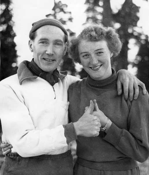 Valter Nyström and Nell Sjöström